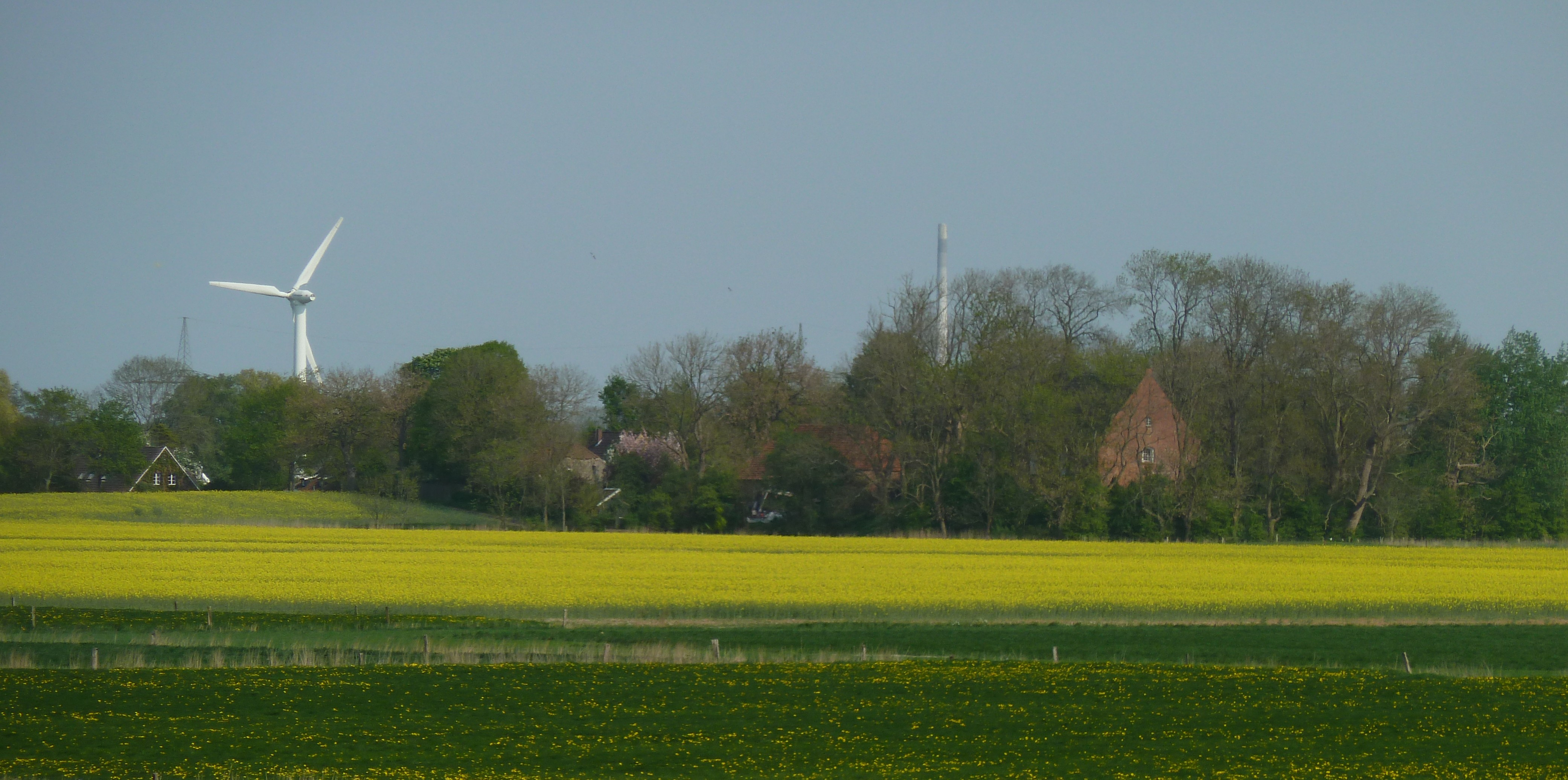 Panoramaansicht des Dorfes Wüppels (Gemeinde Wangerland, Landkreis Friesland).